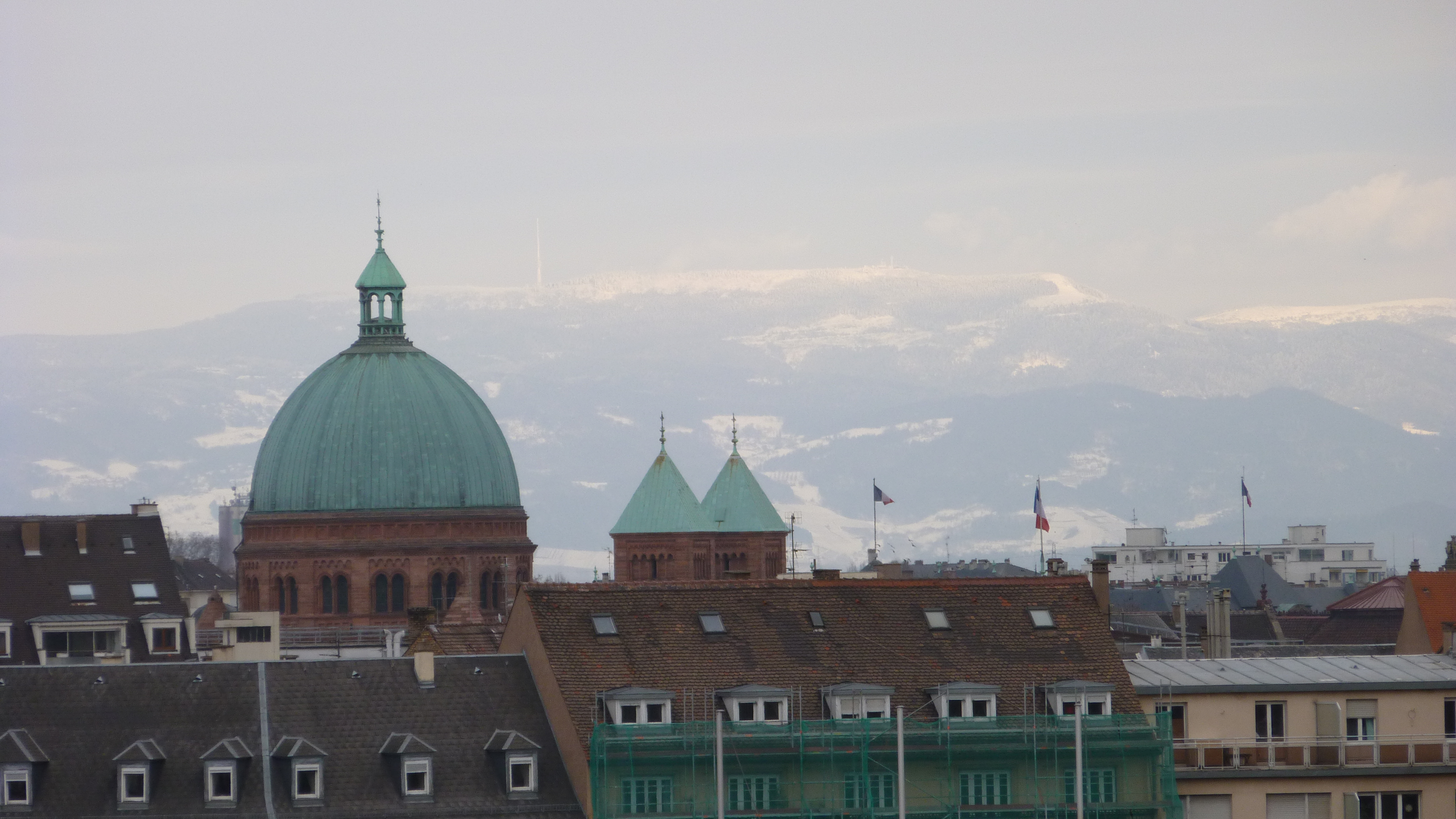 Église saint Pierre le Jeune catholique de Strasbourg, vue depuis le dernier étage du parking Wodli. On voit au fond le Hornisgrinde enneigée.